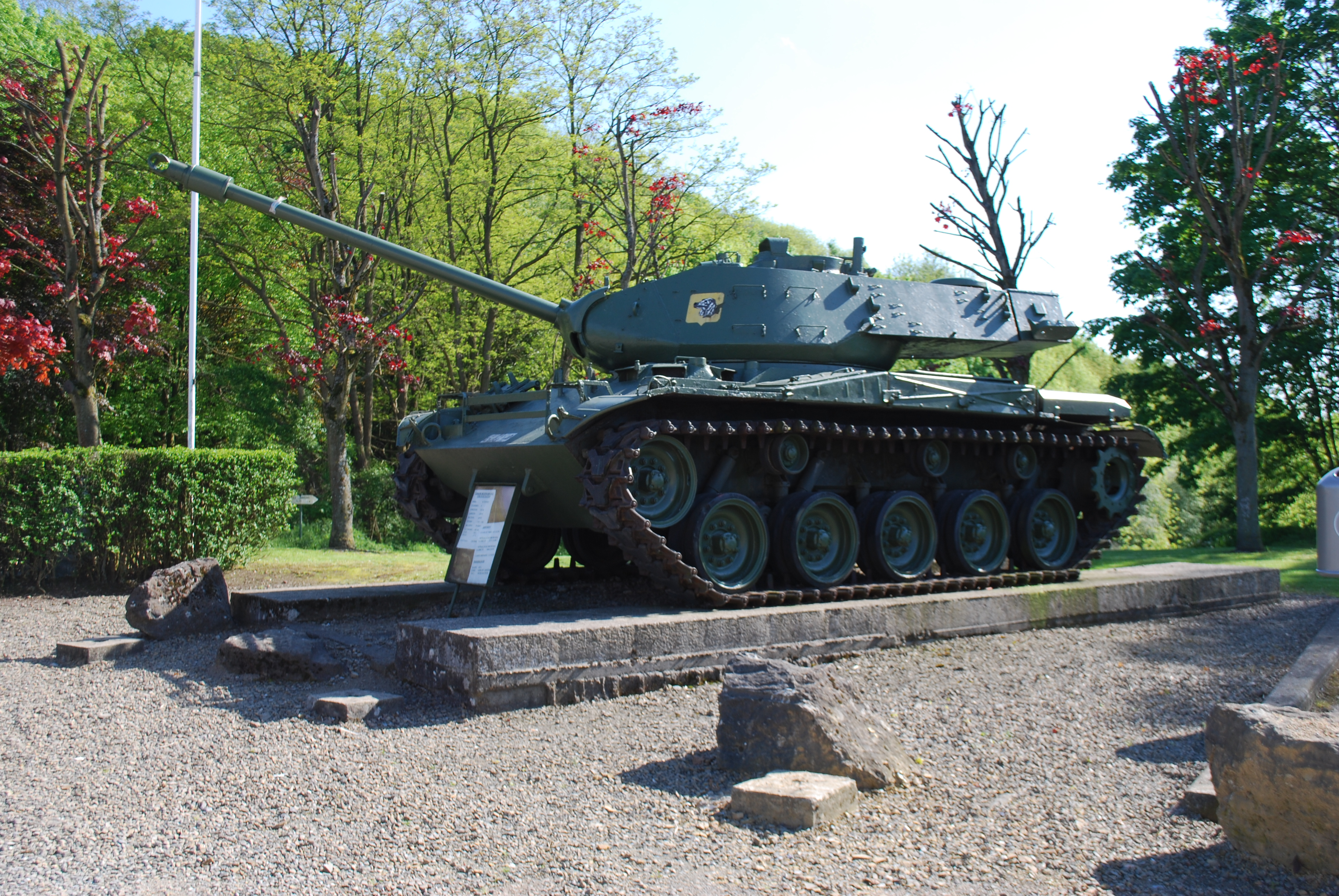 Vue du monument du char M41 Walker Bulldog, au pied du fort d'Embourg.